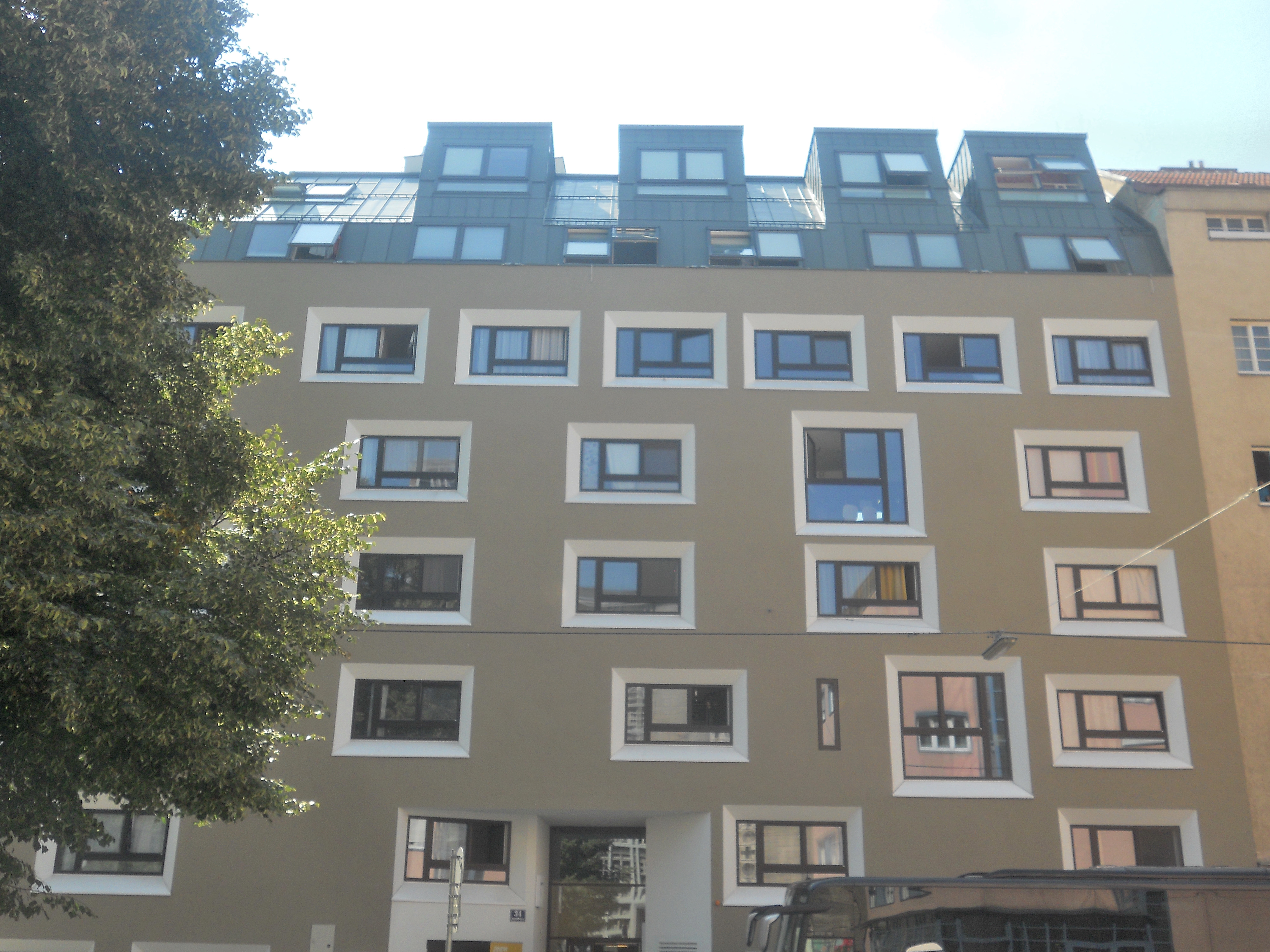 Obdachlosenasyl "Neunerhaus" in der Hagenmüllergasse 34, Wien